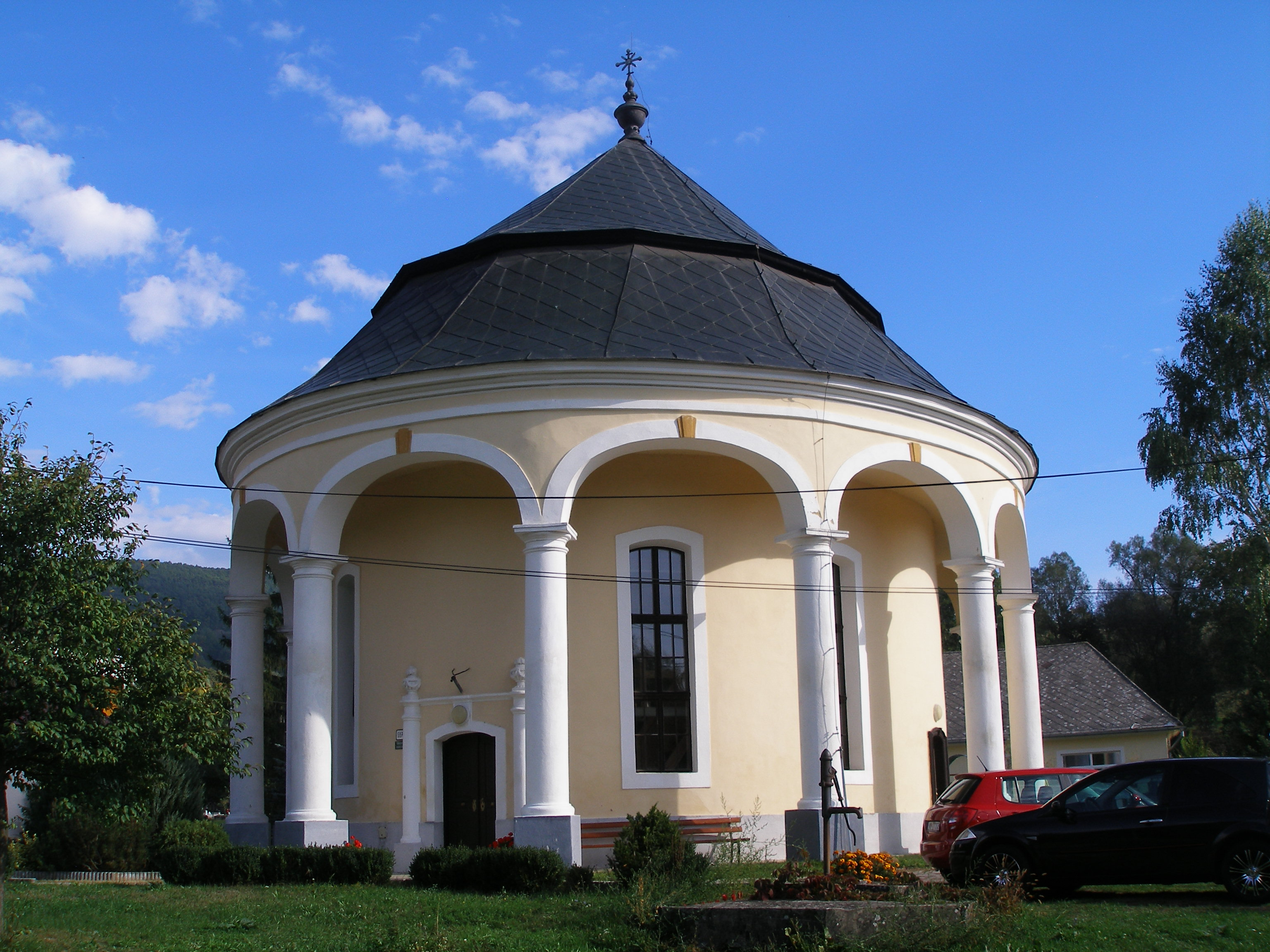 Kostel v Zemianskom Podhradie (pohled od jihozápadu).